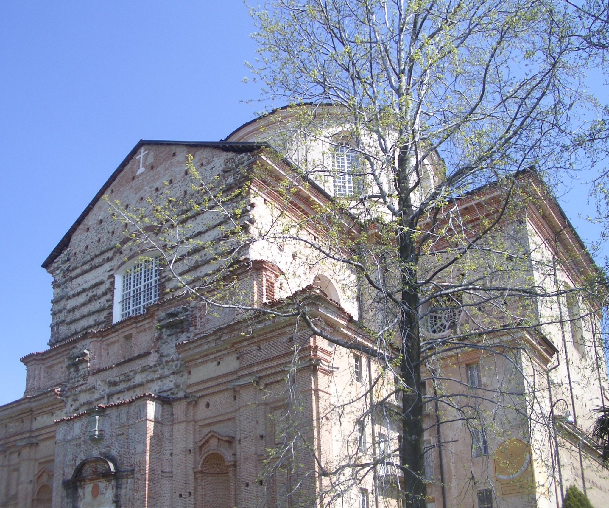 Santuario della B.V. di Loreto, Graglia (Biella), Italy